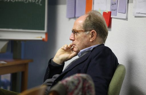 Kriegsenkeltagung, Helmstedt 2014